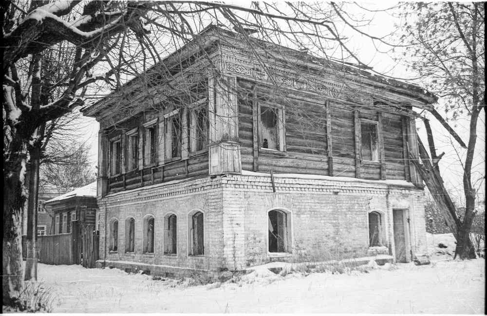 Переславль, Советская улица, дом 11. Здание, в котором с 29 июня 2002 года работает Музей утюга. Хозяин Музея утюга Андрей Николаевич Воробьёв купил этот дом в декабре 1999 года именно в таком полусгоревшем виде.